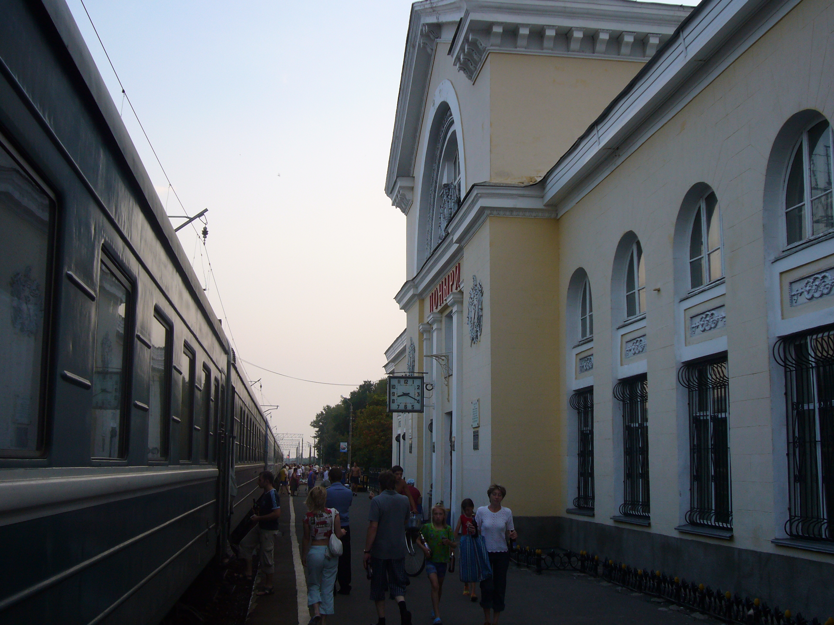 At railway station of Ponyri, Kursk Region, Russia / Железнодорожный вокзал станции Поныри Курской области.